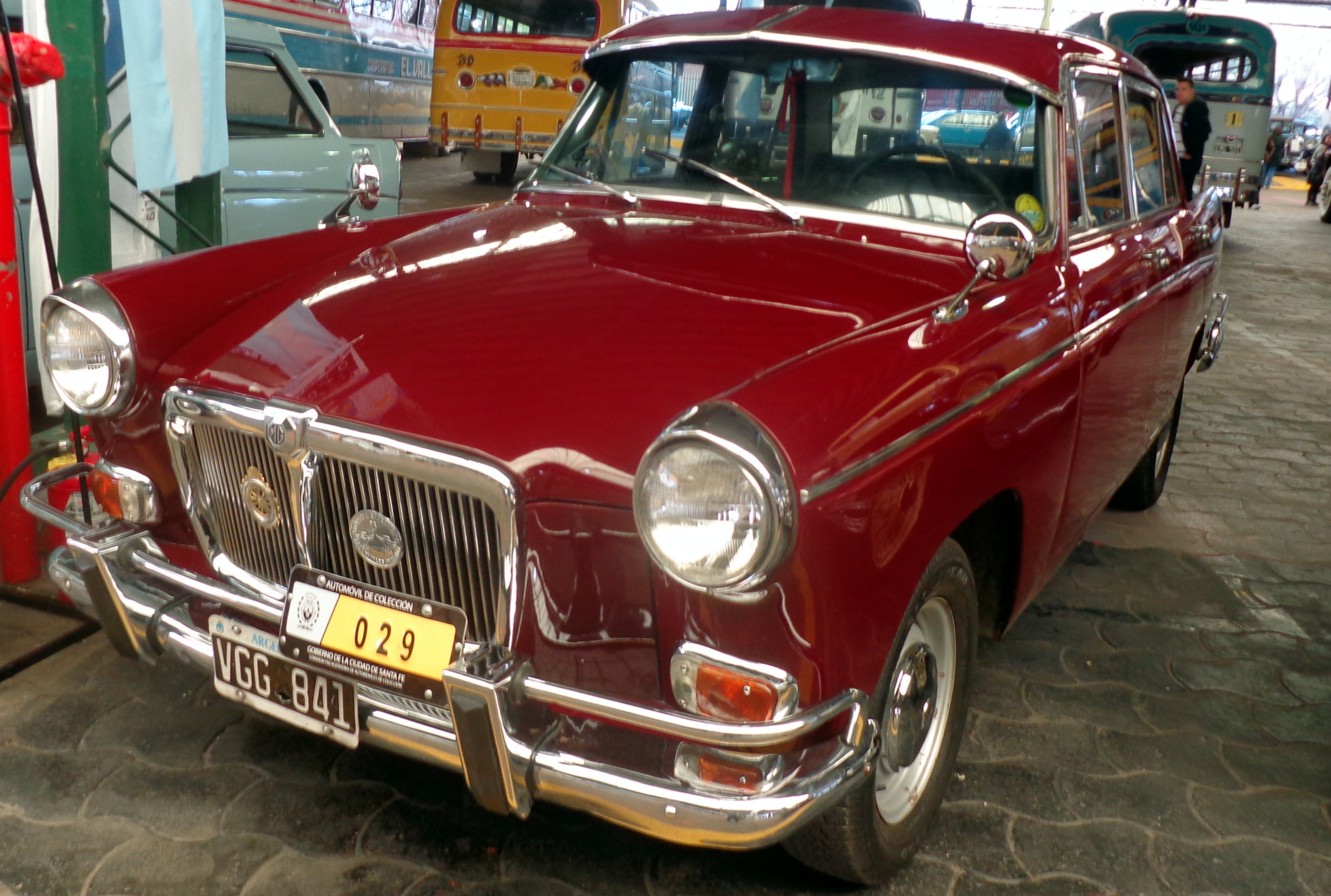 Siam Di Tella Magnette, Buenos Aires, Argentina.